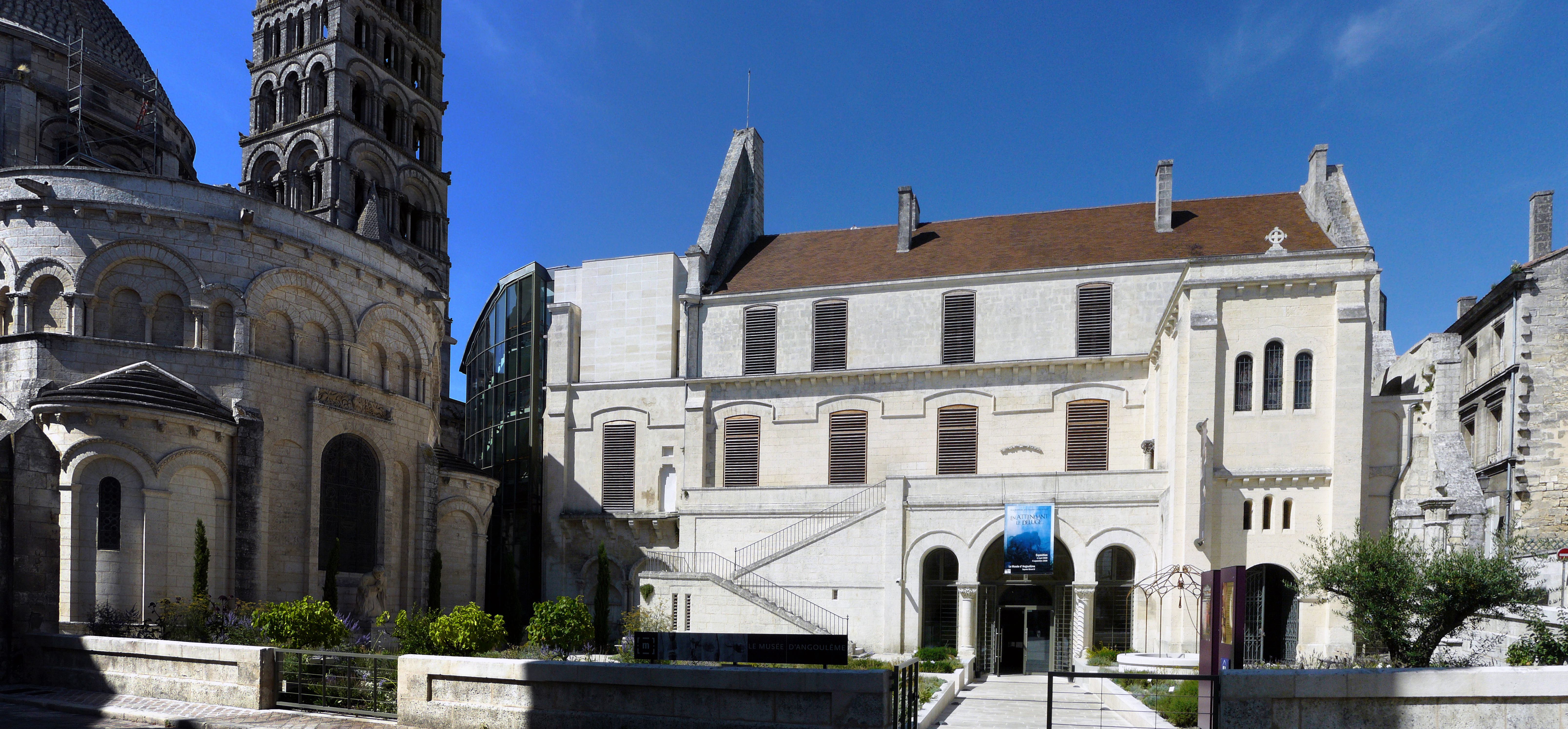 Panorama 4x1, Musée des beaux Arts, Angoulême (16), France